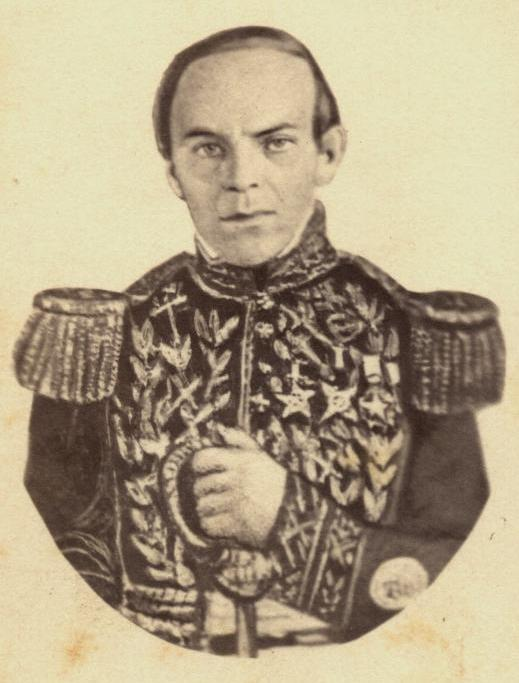 Juan Vidaurre-Leal Morla (Concepción, 1802 - Valparaíso, 18 de septiembre de 1859) fue un militar chileno.